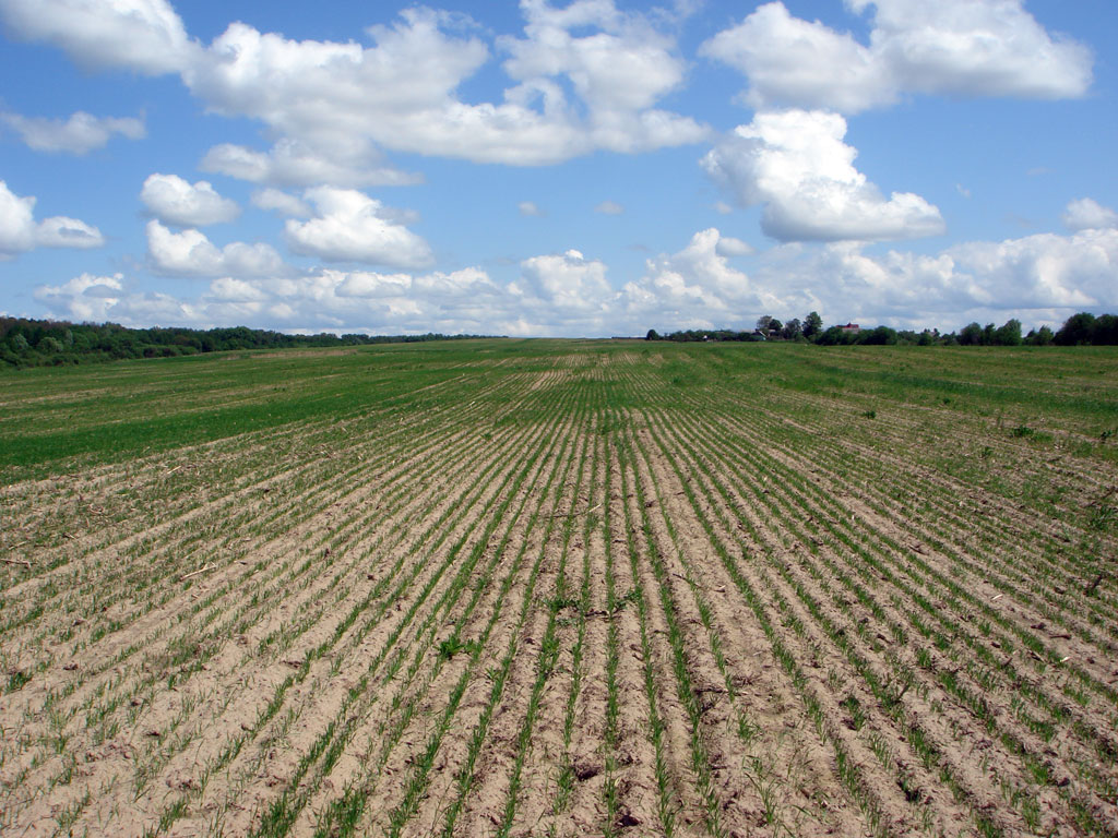 Радиостанция «Голиаф».